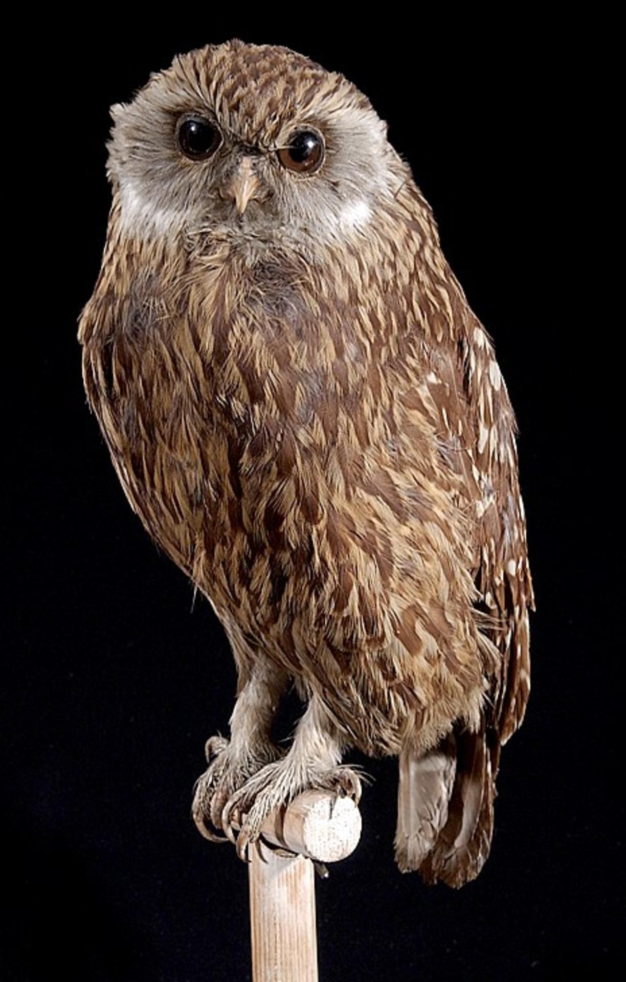 Sceloglaux albifacies Gray, G.R., 1844